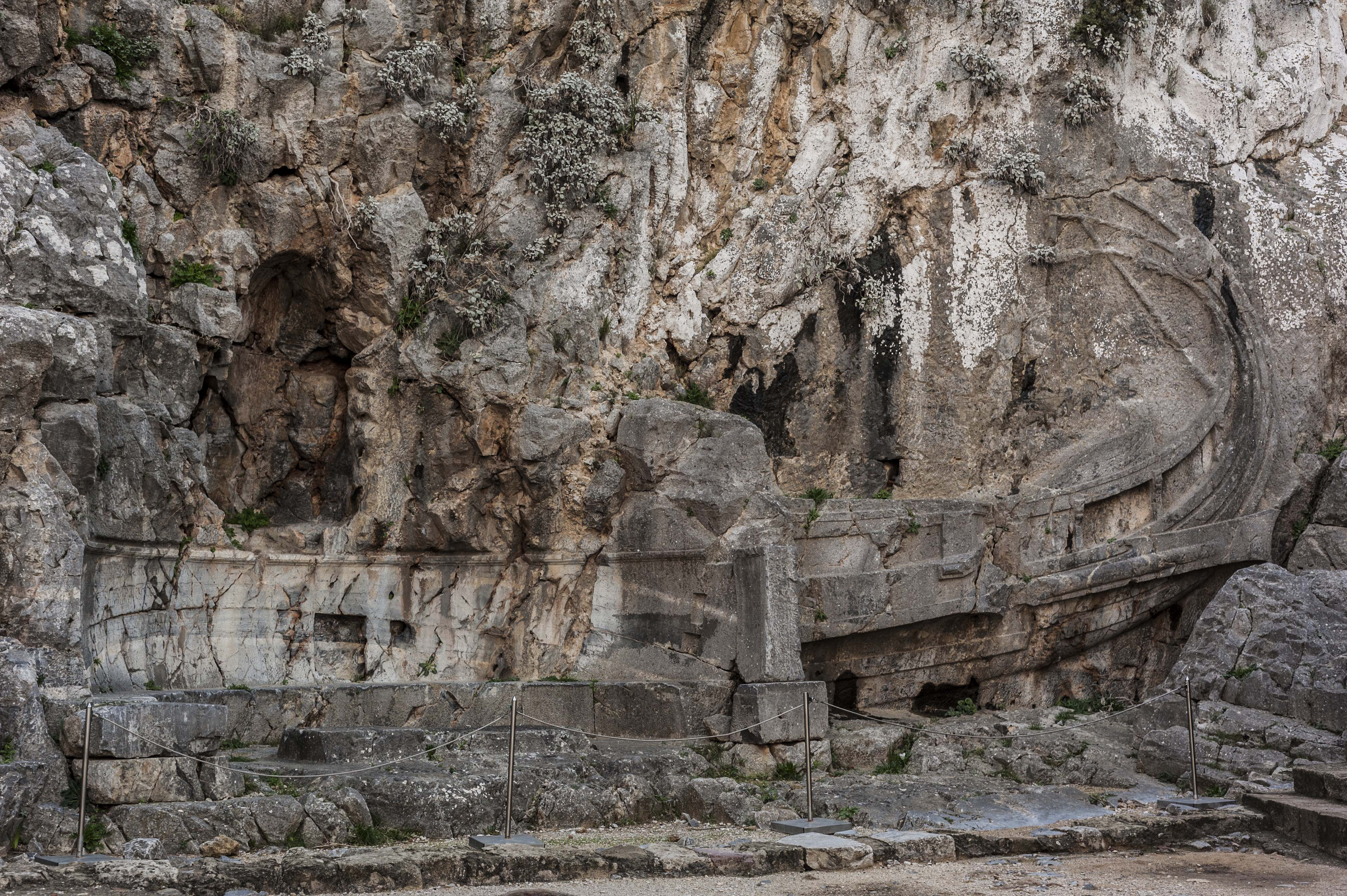 Τριήρις